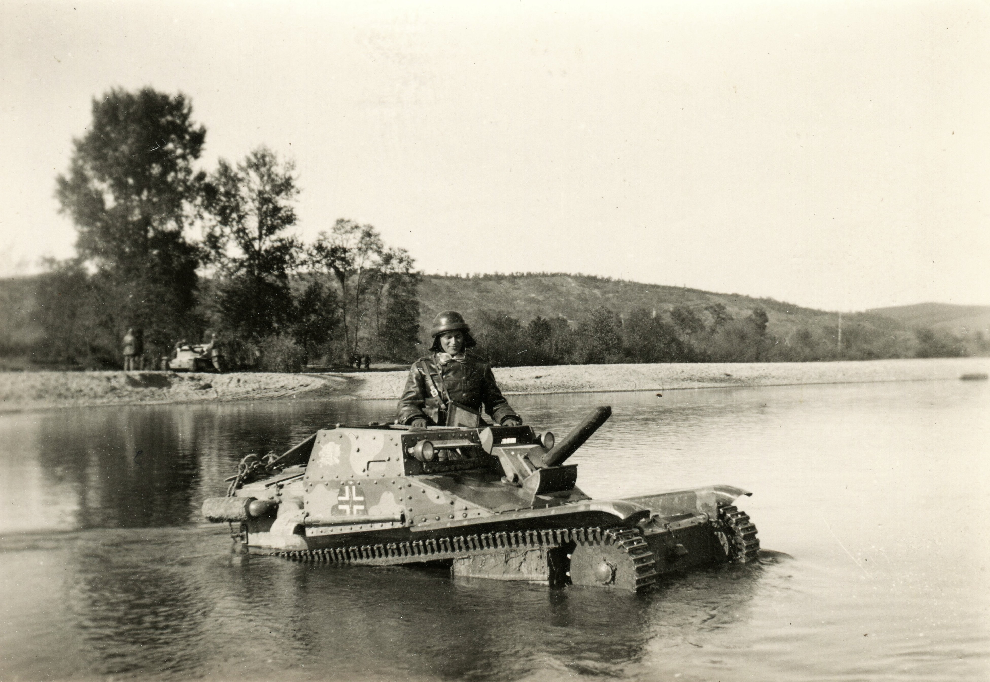 Tags: tank, Fiat-brand